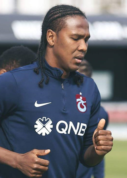 Уго Родальега